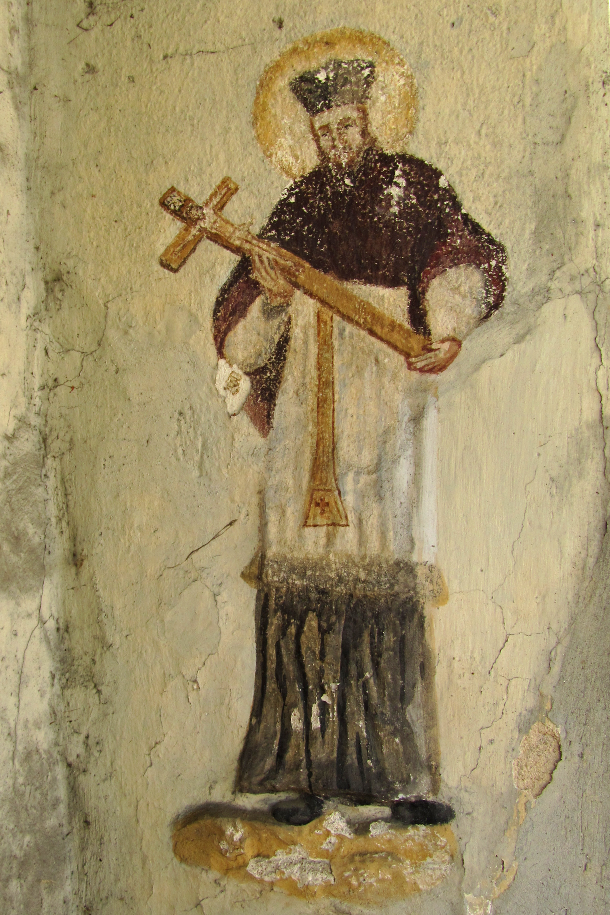 Gemälde- Relief des hl Johannes Nepomuk in der barocken Wegkapelle, wahrscheinlich aus der ersten Hälfte des 18. Jahrhunderts.